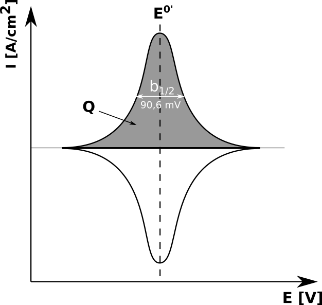 Modelowy woltamperogram cykliczny dla idealnie odwracalnego układu redoks zaadsorbowanego na elektrodzie